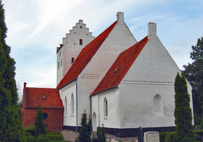 fra sydøst